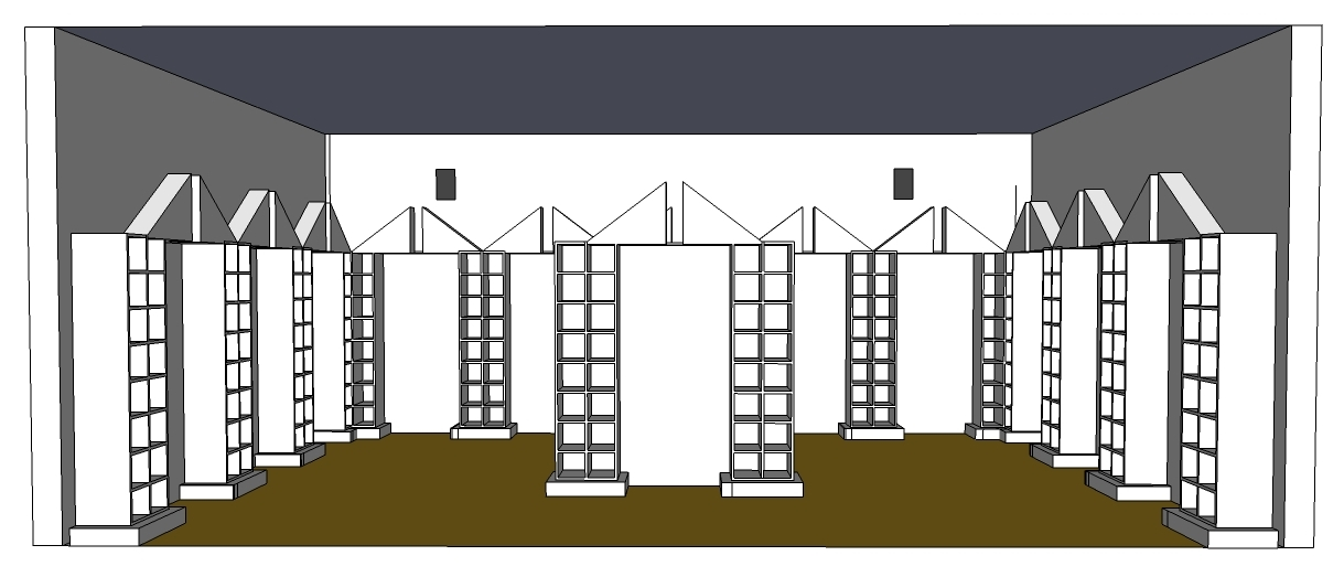 Vista dell'allestimento L'interno dopo la forma dell'utile, presentato all'interno della mostra "la sistemazione del design" alla XVI edizione della Triennale di Milano